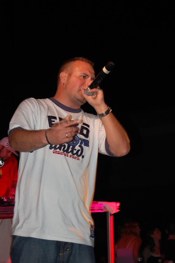 Harlot en concierto en Barcelona